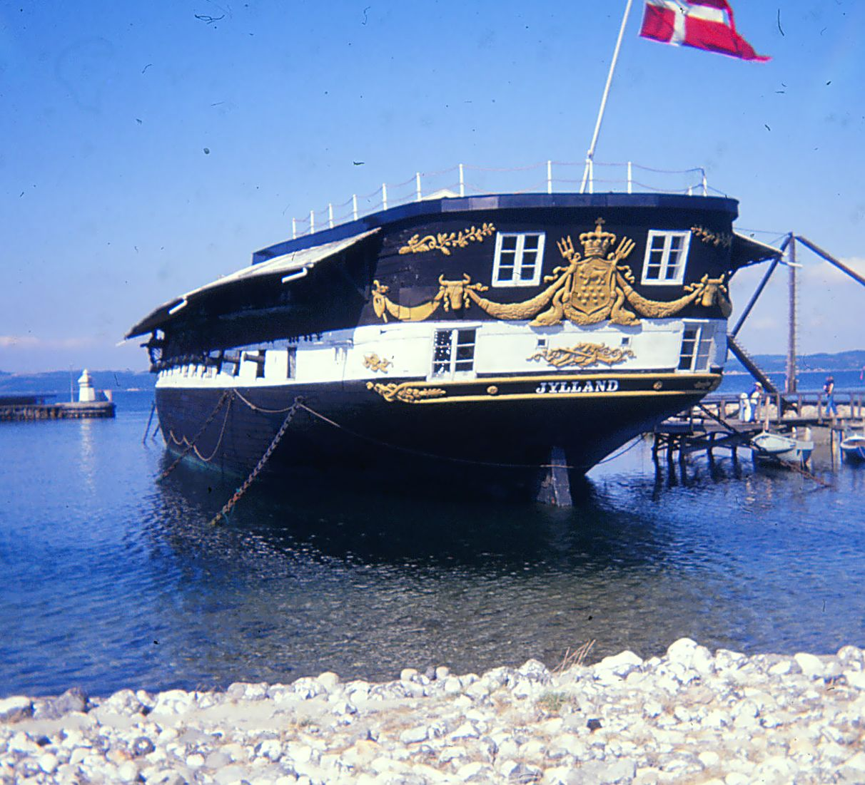 Fregatten Jylland i Ebeltoft, sommeren 1978.